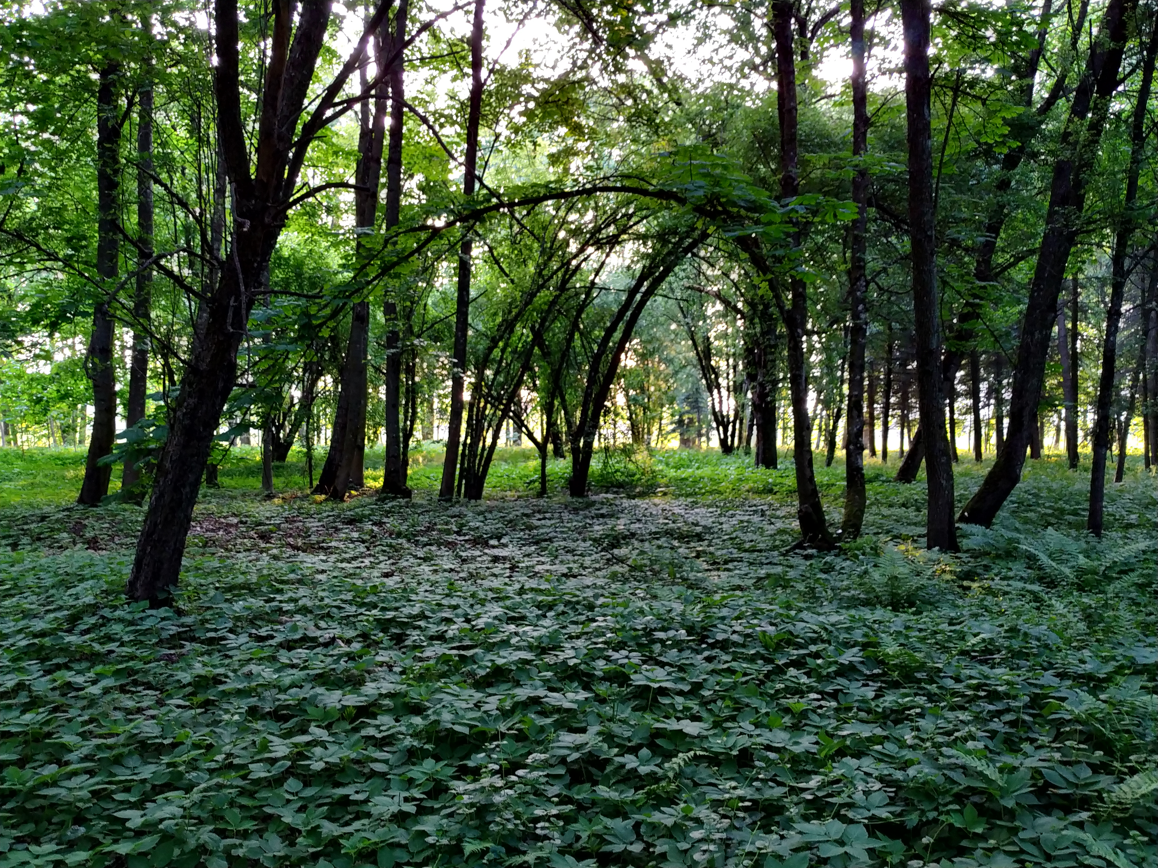 Размещается на территории ботанического памятника природы «Парк Горни» в п. Горни (южная окраина г.Лида, в 2 км от магистральной автотрассы М-6/Е28 Минск-Гродно- граница Республики Польша). Парк «Горни» является уникальным ботаническим объектом, представляющим дендрологическую ценность, имеет научное, историческое и эколого-просветительское значение. Посещение центра и парка оставит неизгладимые впечатления, порожденные величием этого природного комплекса, представленного величественными вековыми аллеями и отдельными деревьями выдающихся размеров и возраста. На базе центра сформирована информационная база, включающая легкодоступную объективную информацию о биологическом разнообразии Беларуси, Гродненщины и Лидского района в частности, о существующих тенденциях в использовании природных ресурсов, новых методах ведения лесного хозяйства, организации и управления природоохранными территориями; создана развивающаяся инфраструктура туристического бизнеса.